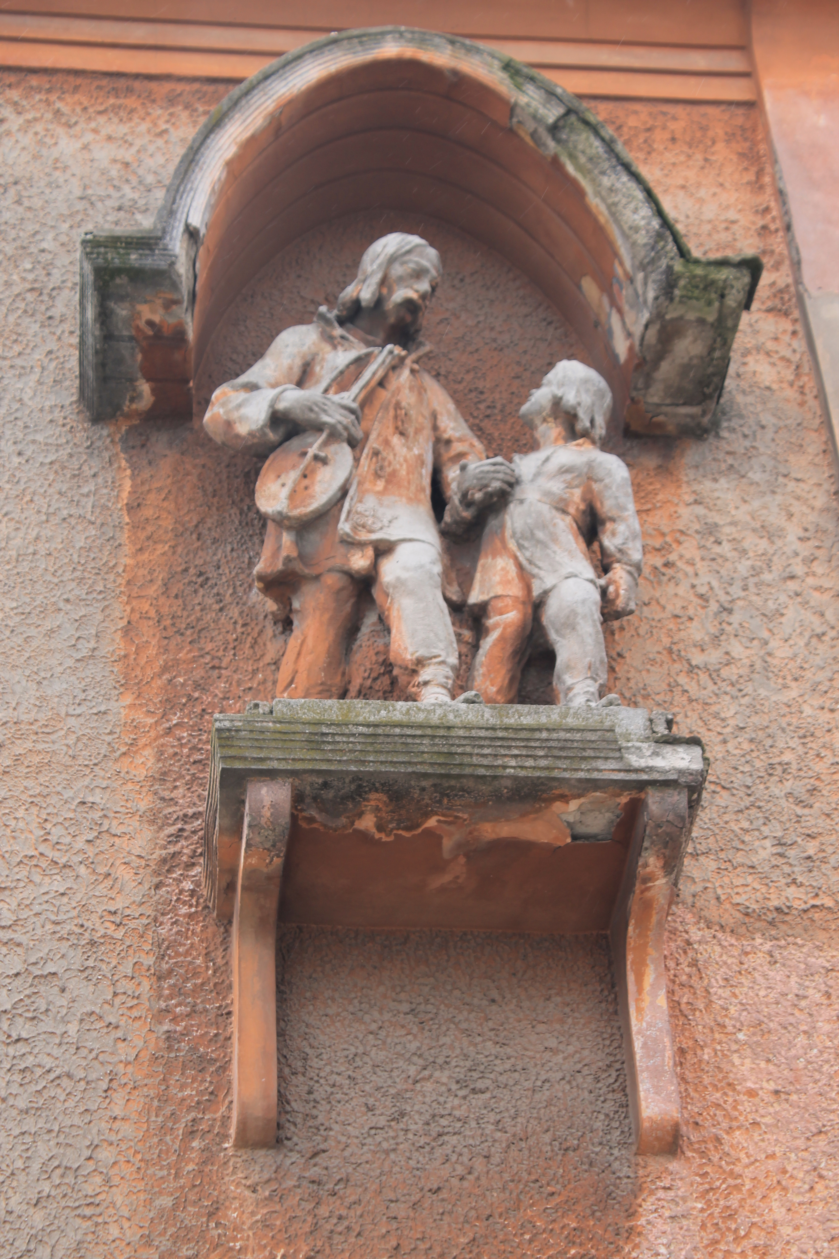 Zgrade, Ruma